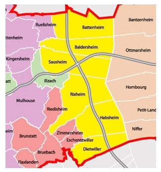 Carte de la Communauté des Communes de l'Île Napoléon